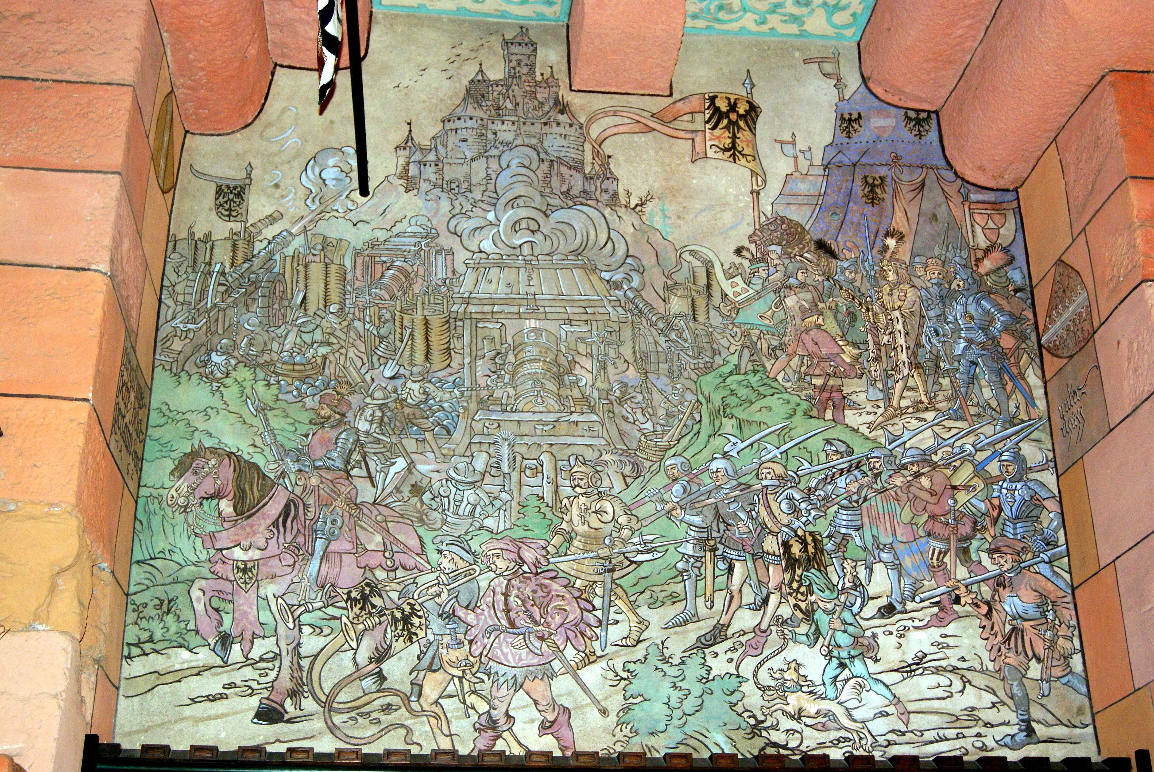 Salle de banquet à Haut-Koenigsbourg